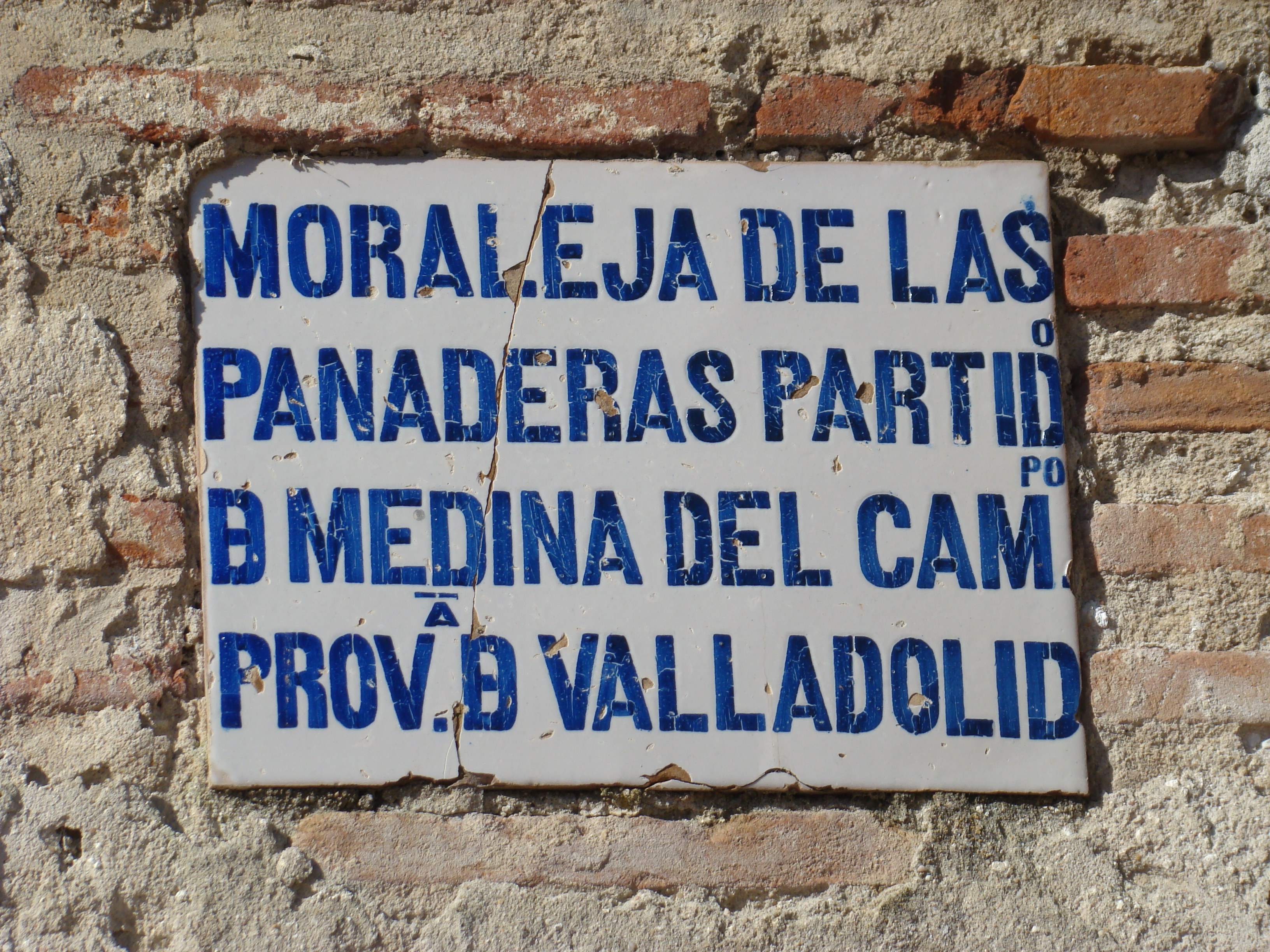 Moraleja de las Panaderas, municipio de Valladolid, España. Placa que indica que en otro tiempo perteneció a la jurisdicción de Medina del Campo.